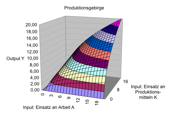 Abbildung einer linear homogenen Cobb-Douglas-Produktionsfunktion als „Produktionsgebirge“